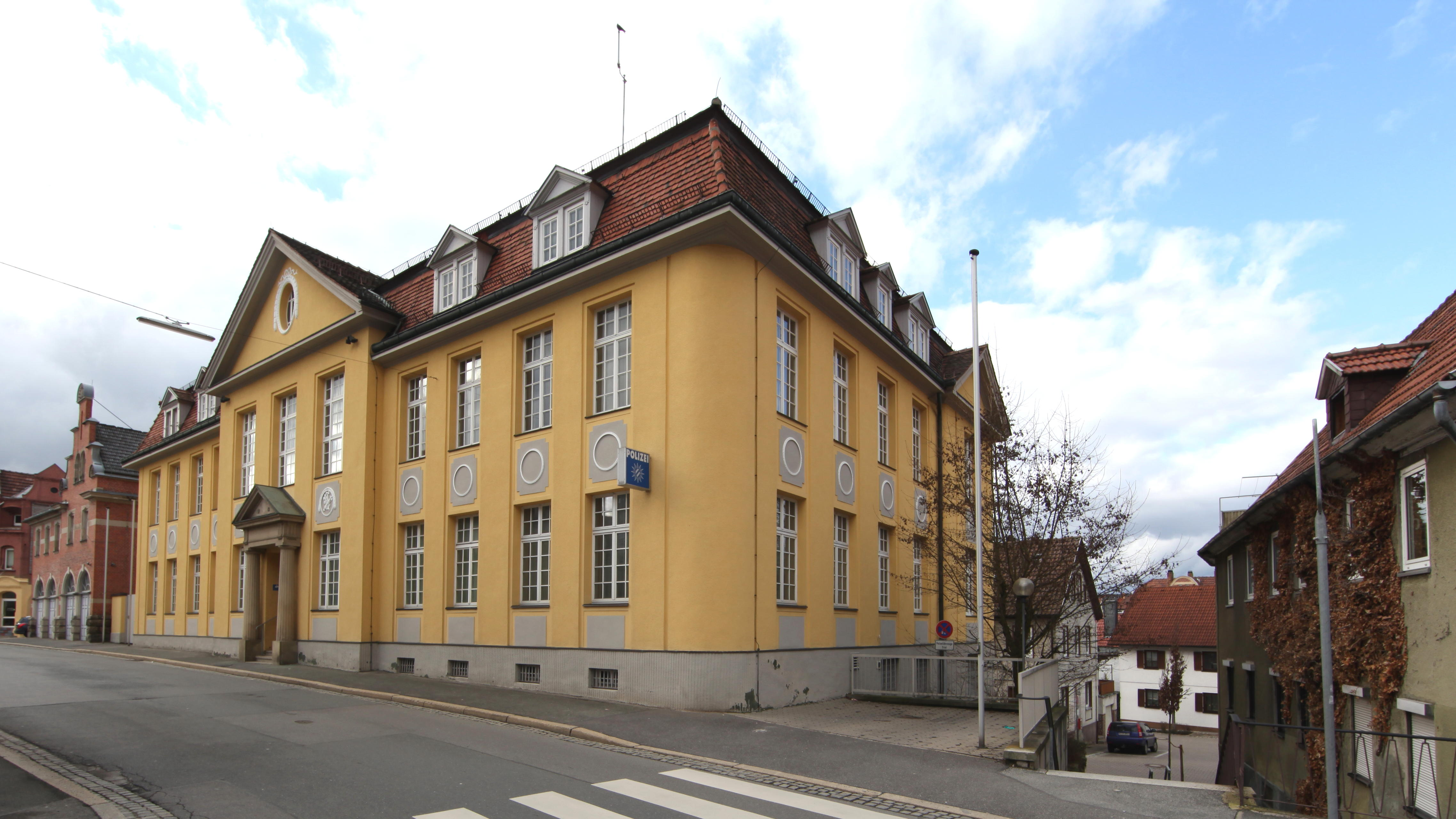 Neustadt bei Coburg, Ernststr 23a